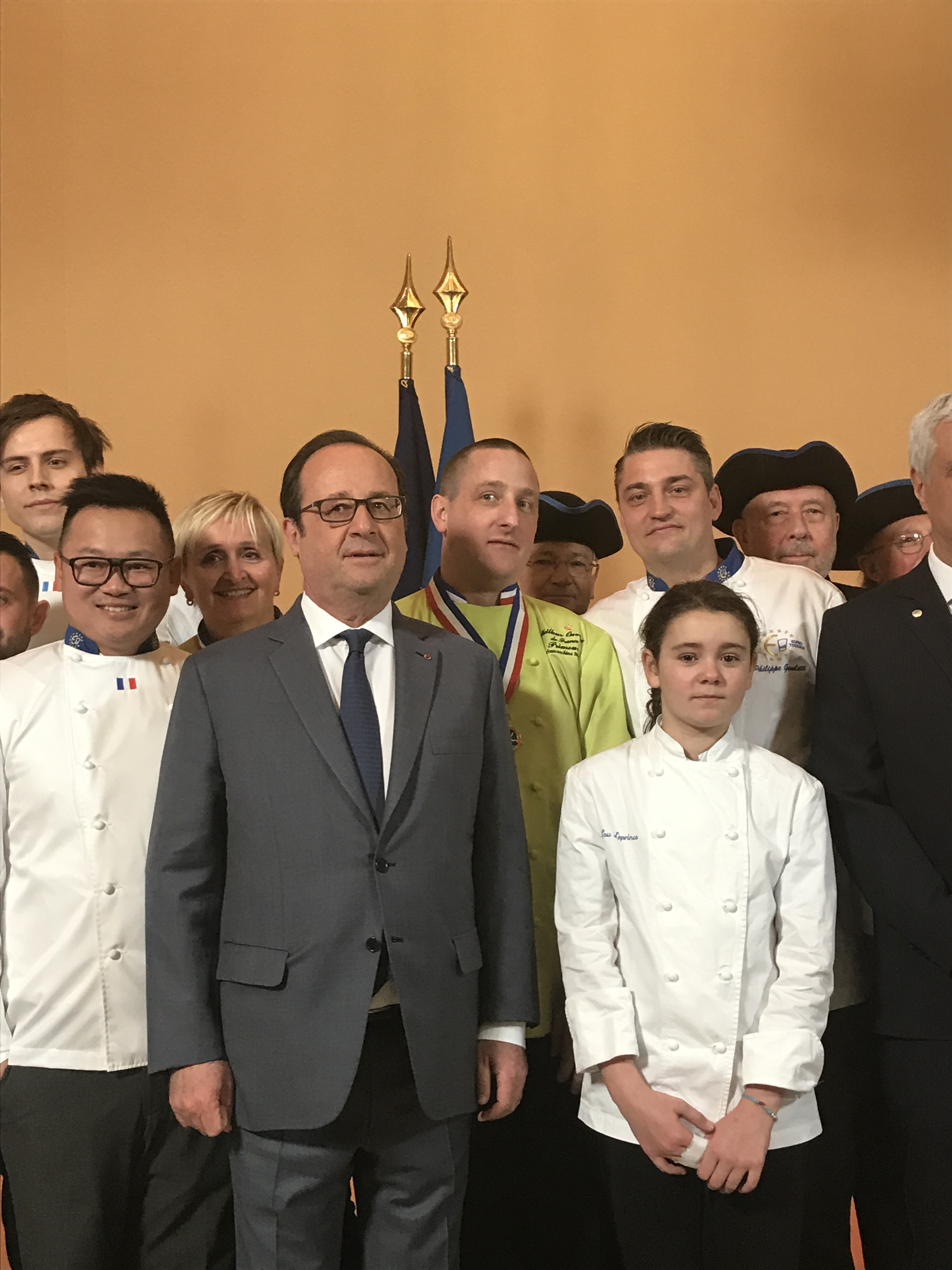 philippe Geneletti